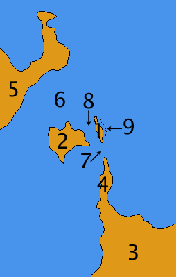 Ostrovy, poloostrovy a útesy v okolí ostrova Kumbli.